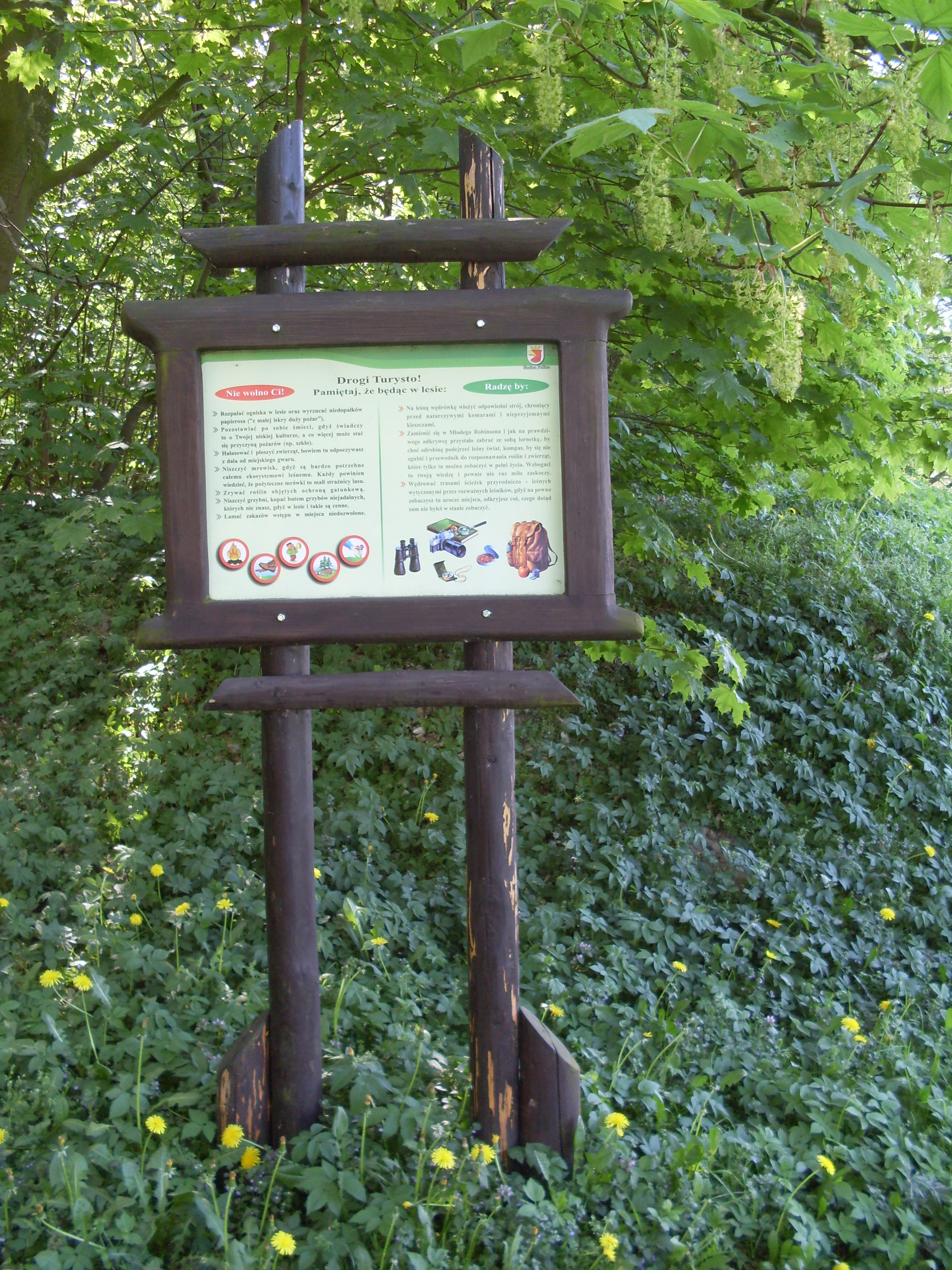 Ekologiczna Ścieżka Rekreacyjno – Dydaktyczna w Policach, Osiedle Gryfitów